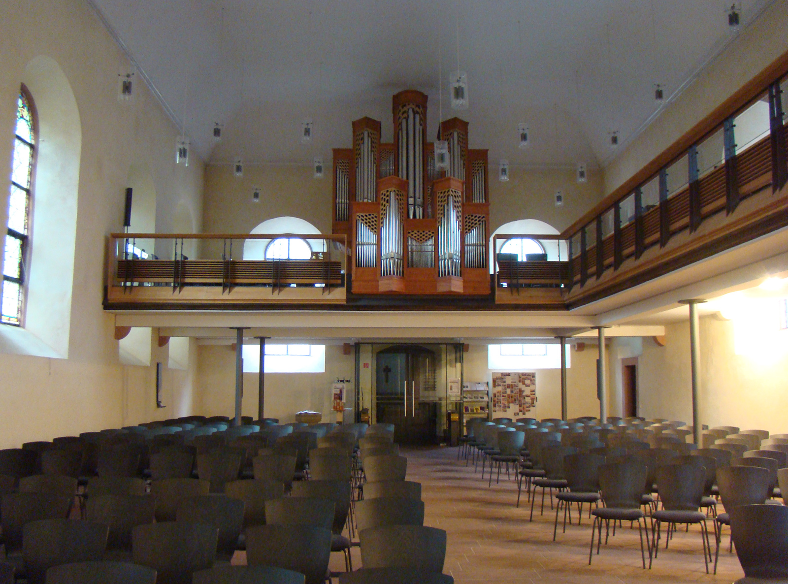 Evangelische Stadtkirche Wiesloch, Langhaus